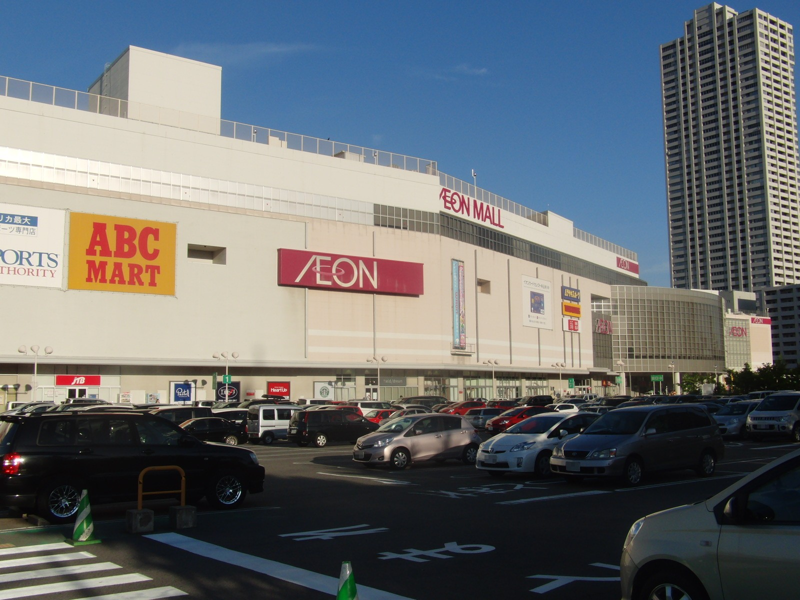 イオンモール熱田を撮影